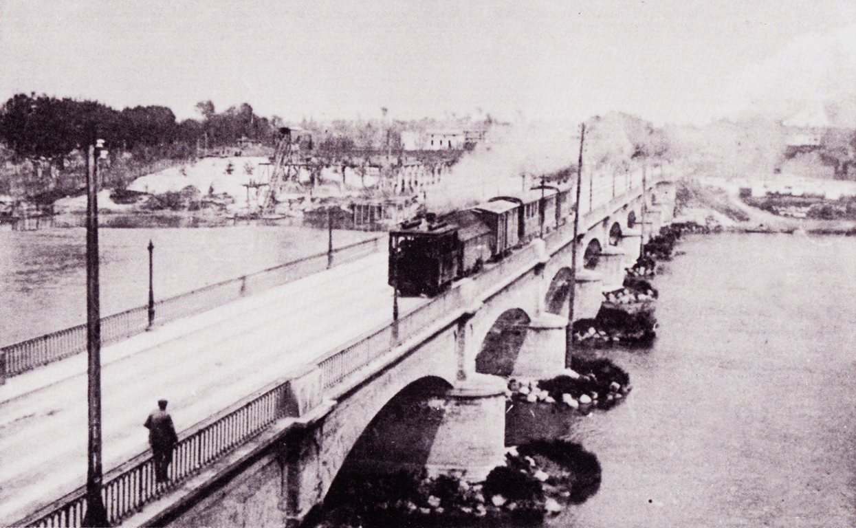 Il ponte sull'Adda di Lodi, percorso da un convoglio tranviario a vapore proveniente da Treviglio o Soncino, agli inizi del XX secolo